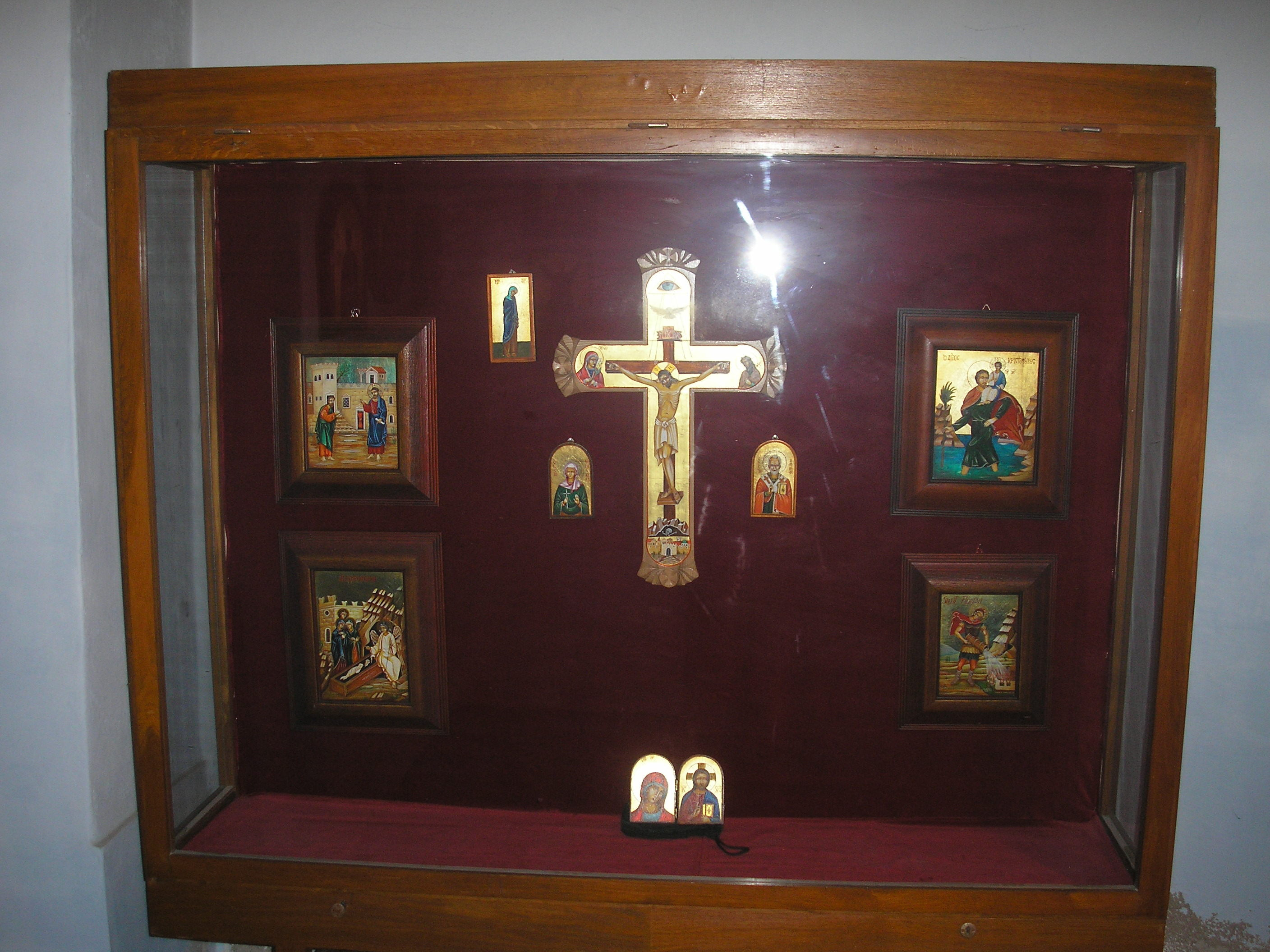 II. Szerb Ortodox Napok: Jószai Sándor ikon-kiállítás (Szerb ortodox templom, Szeged)